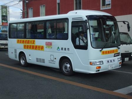 朝倉市市街地巡回バス